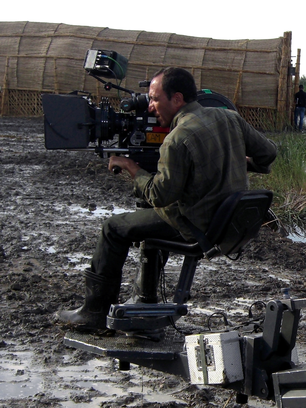 Abbas Fahdel sur le tournage de L'Aube du monde en novembre 2007.